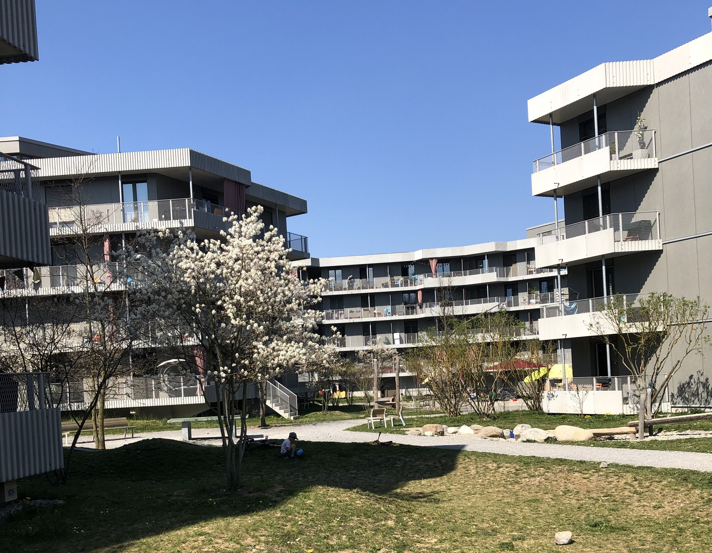 Stöckacker Süd